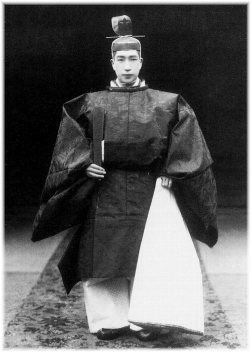 衣冠姿の竹田宮恒徳王。